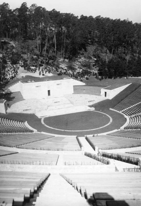 Berlin Reichssportfeld